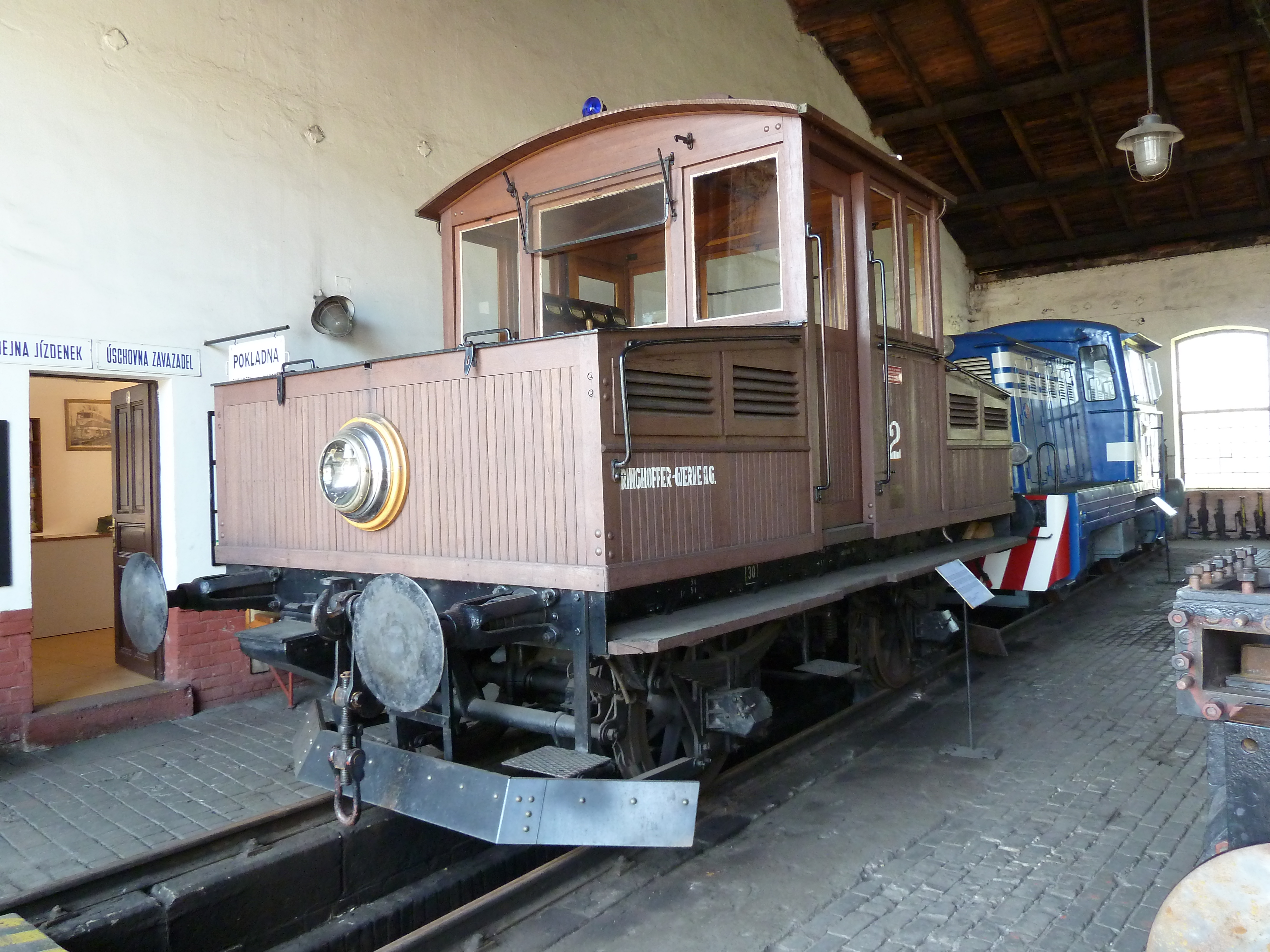 Akumulační lokomotiva Ringhoffer č.2 v Jaroměři v létě 2011